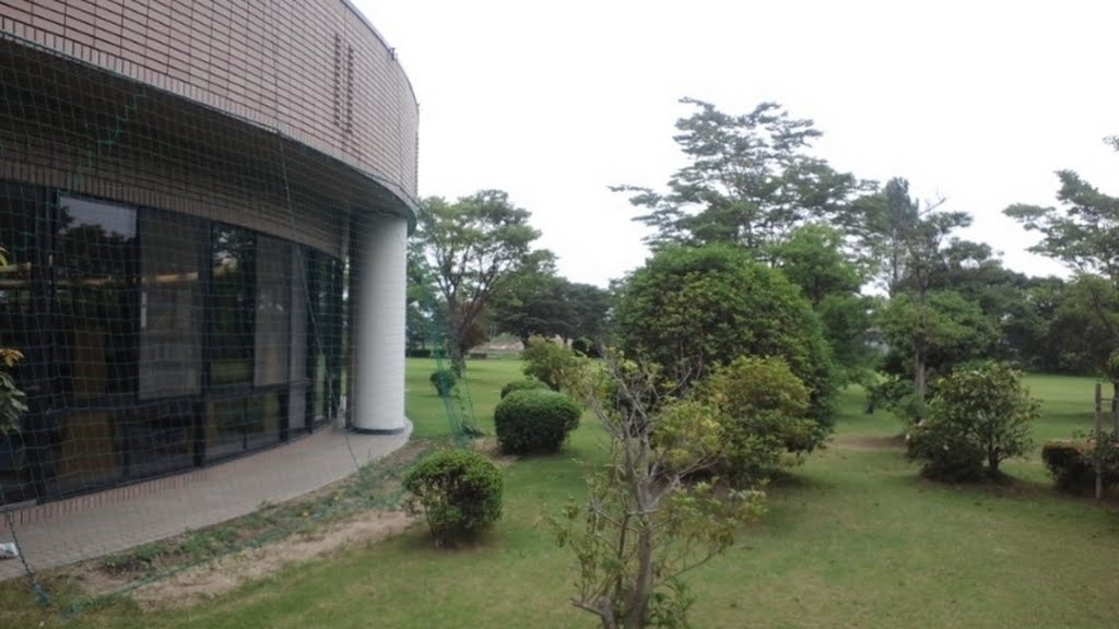 東員町立図書館。